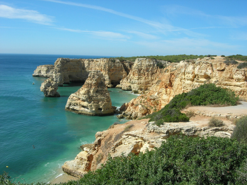 Die Algarve in Portugal.